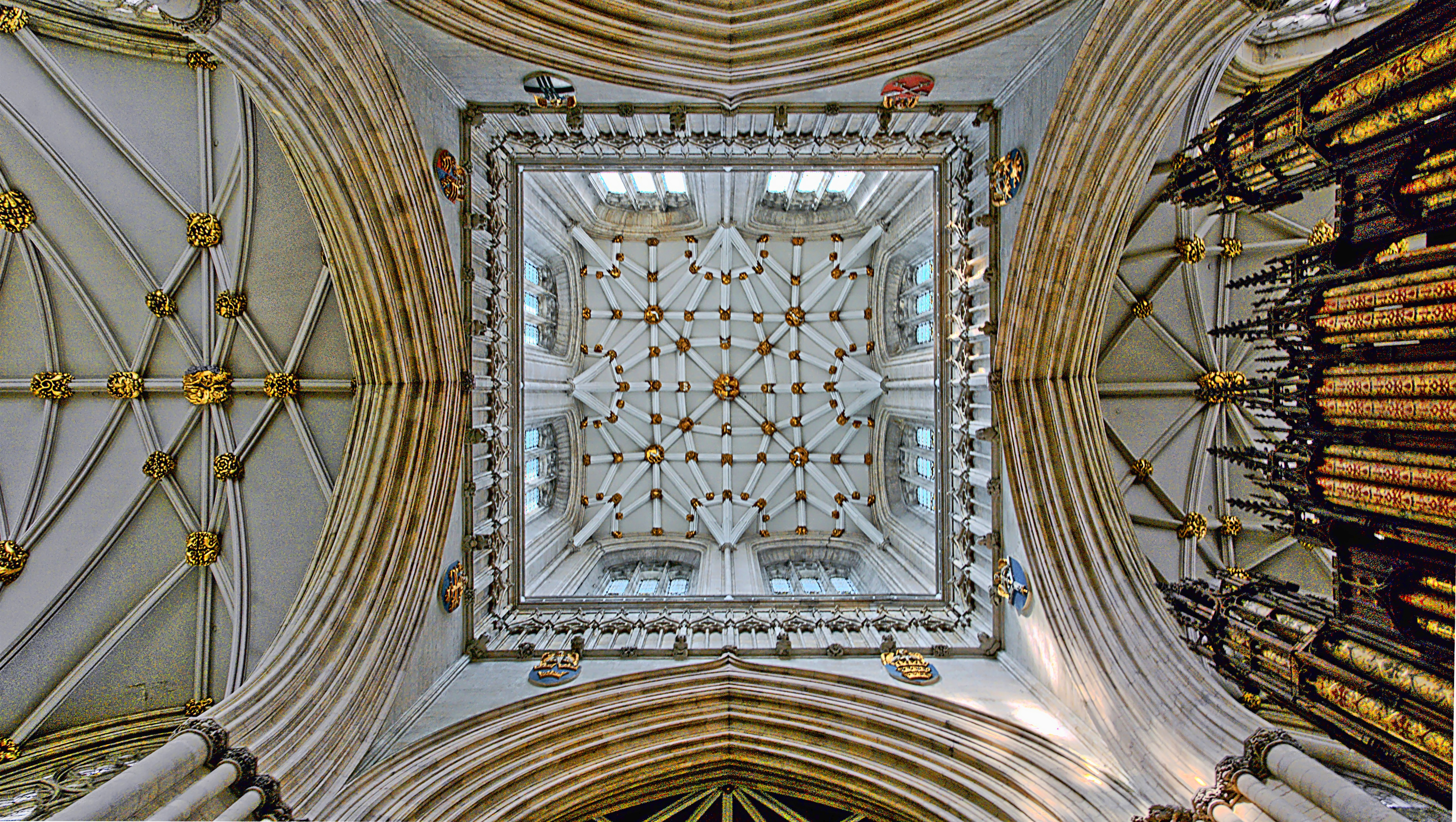 York Minster Crossing